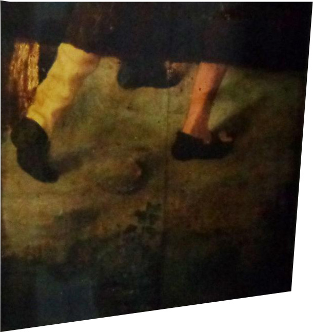 Trabalho de restauro do Laboratório José de Figueiredo.